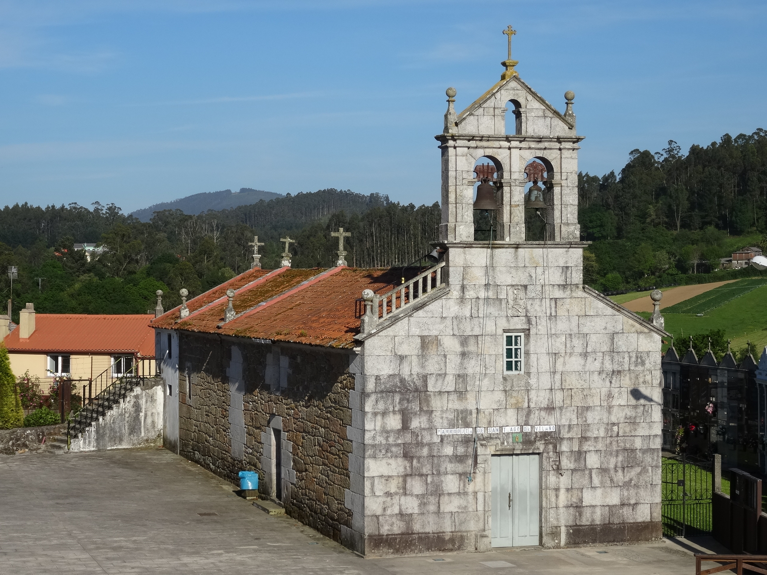 Igrexa de Santiago de Vilaño, A Laracha.